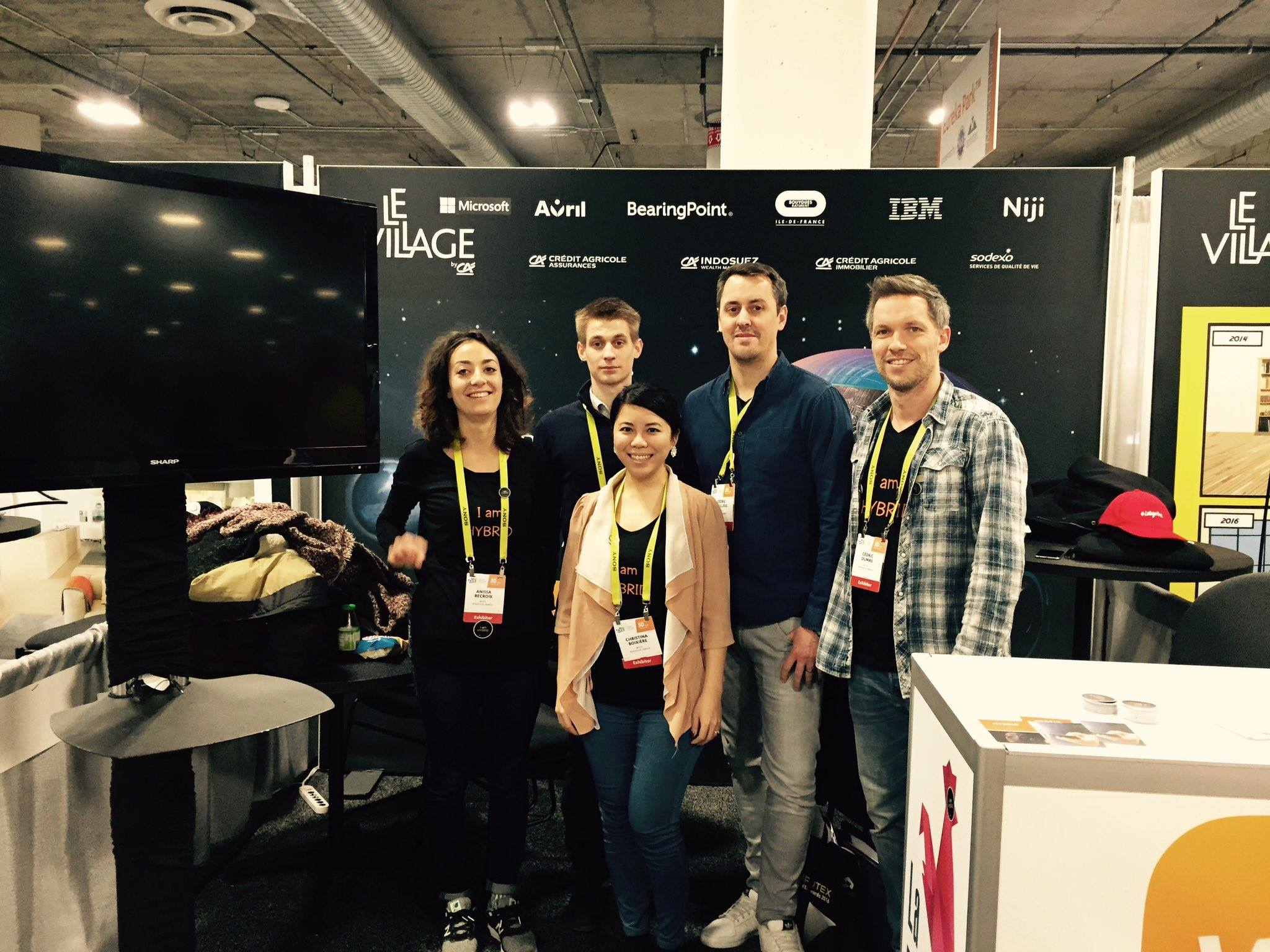 L'équipe de Wiidii était au salon de CES 2017 à Las Vegas.